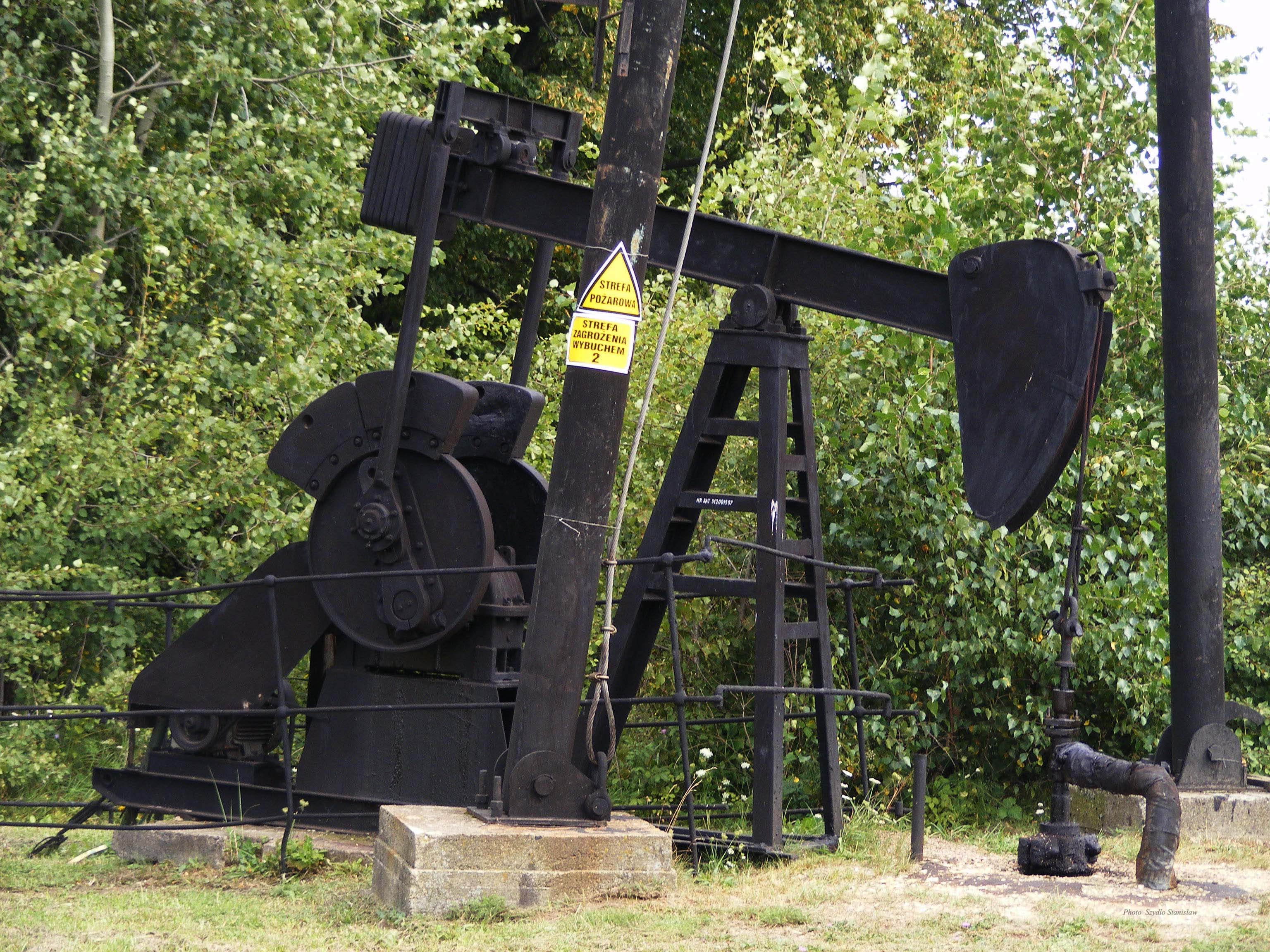 Bóbrka,kiwon pompujący ropę naftową